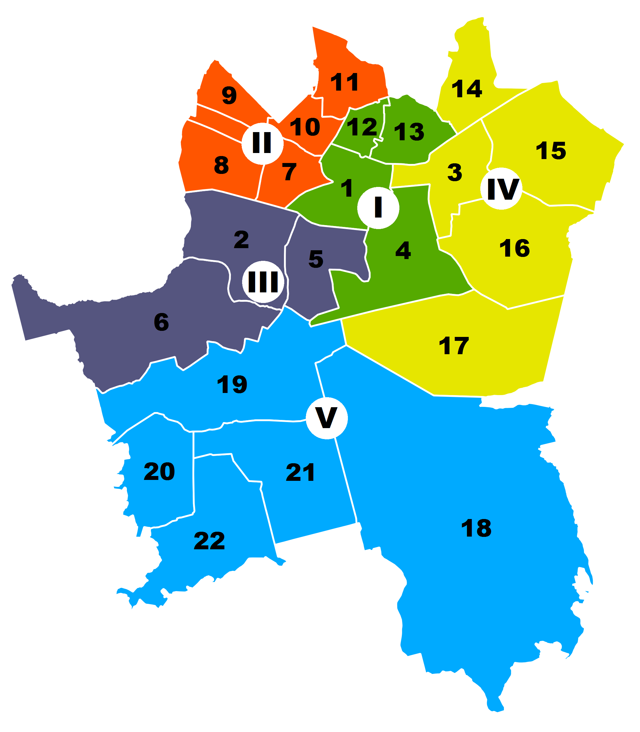 Jednostki Pomocnicze Samorządu miasta Katowice (dzielnice Katowic). I. Zespół dzielnic śródmiejskich (City) 1. Śródmieście 4. Os. Paderewskiego - Muchowiec 12. Koszutka 13. Bogucice II. Zespół dzielnic północnych (North-Town) 7. Załęże 8. Os. Witosa 9. Osiedle Tysiąclecia 10. Dąb 11. Wełnowiec - Józefowiec III. Zespół dzielnic zachodnich (West-Town) 2. Załęska Hałda - Brynów 5. Brynów - Osiedle Zgrzebnioka 6. Ligota - Panewniki IV. Zespół dzielnic wschodnich (East-Town) 3. Zawodzie 14. Dąbrówka Mała 15. Szopienice - Burowiec 16. Janów - Nikiszowiec 17. Giszowiec V. Zespół dzielnic południowych (South-Town) 18. Murcki 19. Piotrowice - Ochojec 20. Zarzecze 21. Kostuchna 22. Podlesie